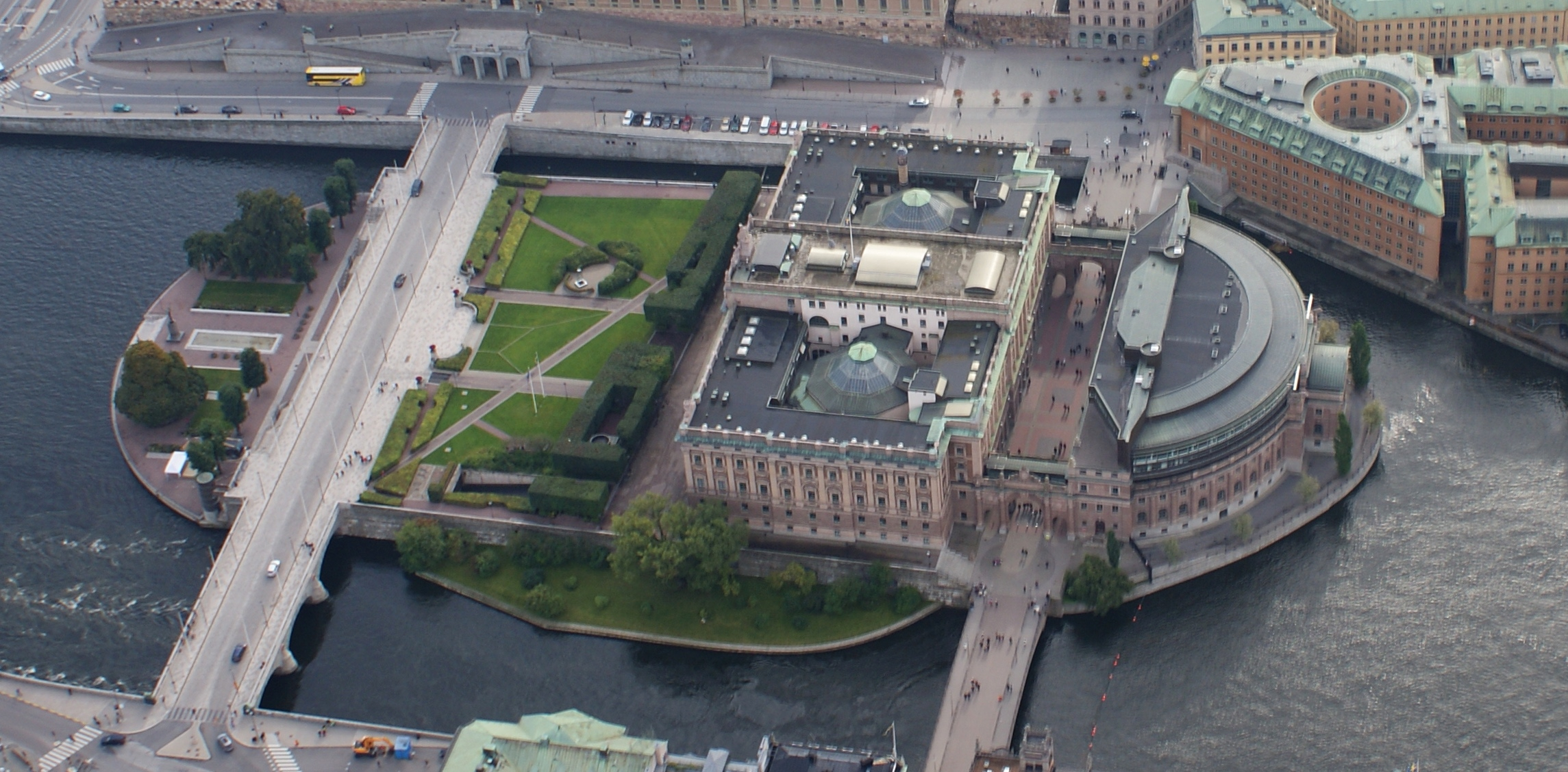 Helgeandsholmen sedd från helikoper.